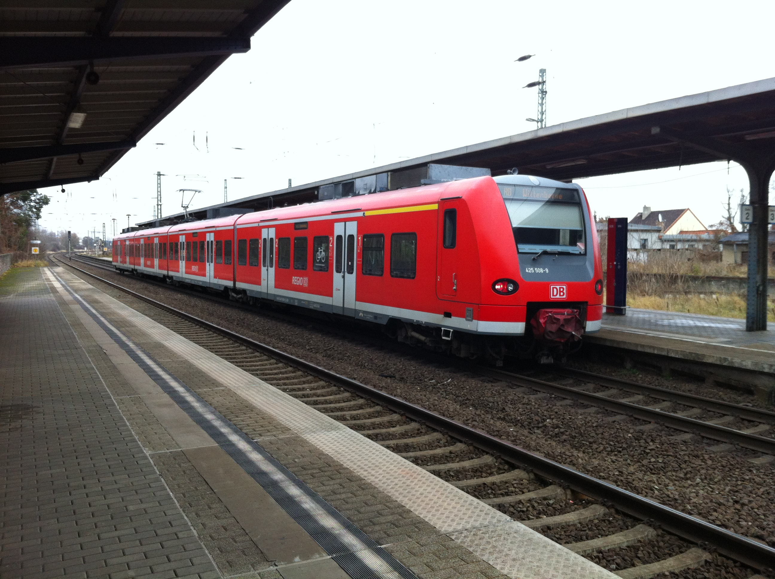 Zug der RB29/30 und S1 Magdeburg im Bahnhof Wolmirstedt